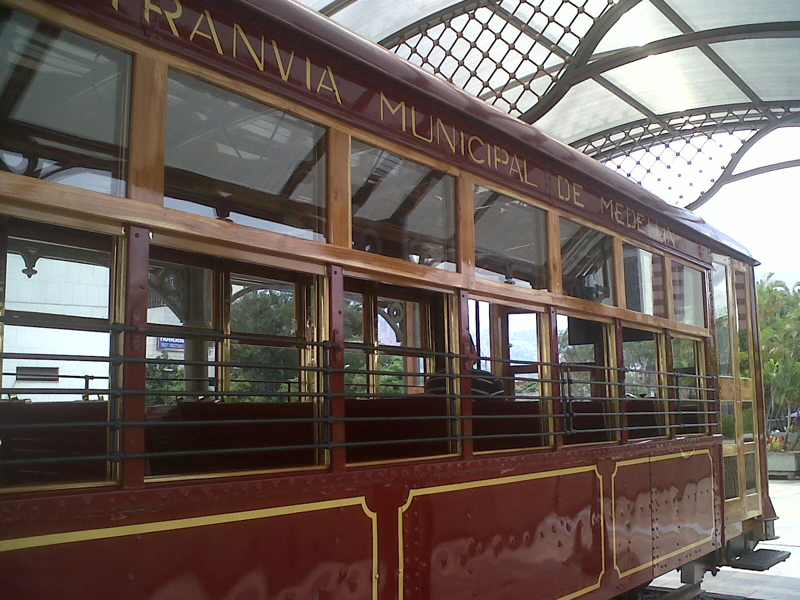 Reconstrucción parte externa del viejo tranvía de Medellín